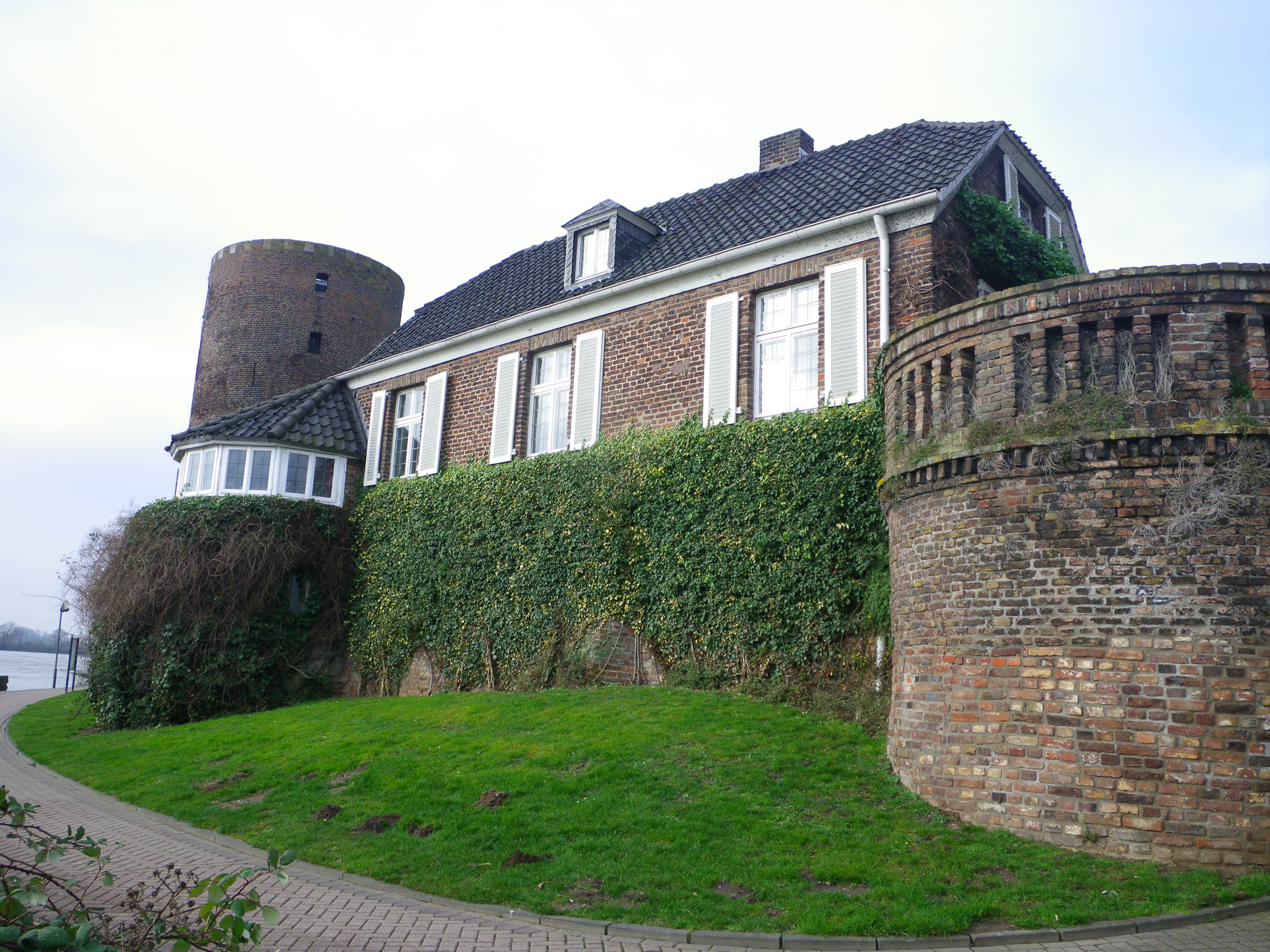 Ortslage: Rees, Am Mühlenturm Denkmalnummer: A 59